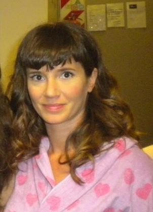 foto que saque yo en polka en los pasillos de la productora cuando fui a visitar a griselda